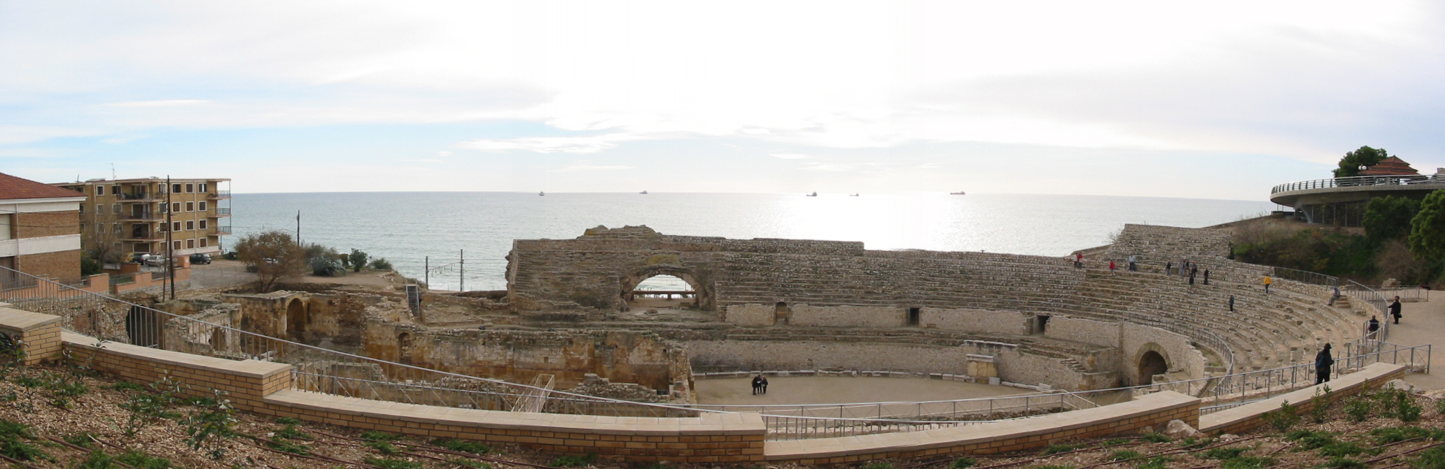 Panoràmica del amfiteatre de Tarragona